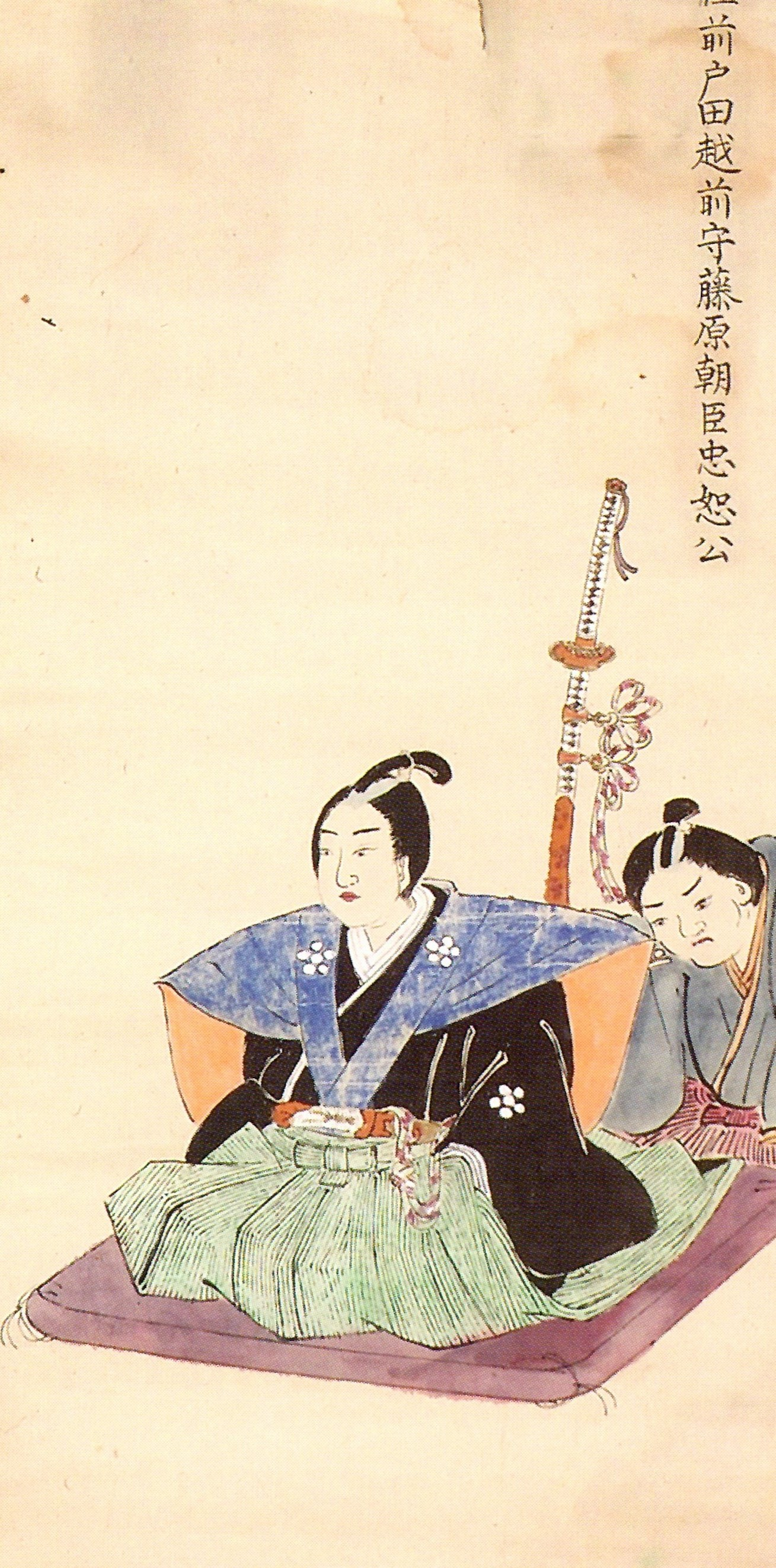 戸田忠恕の肖像。